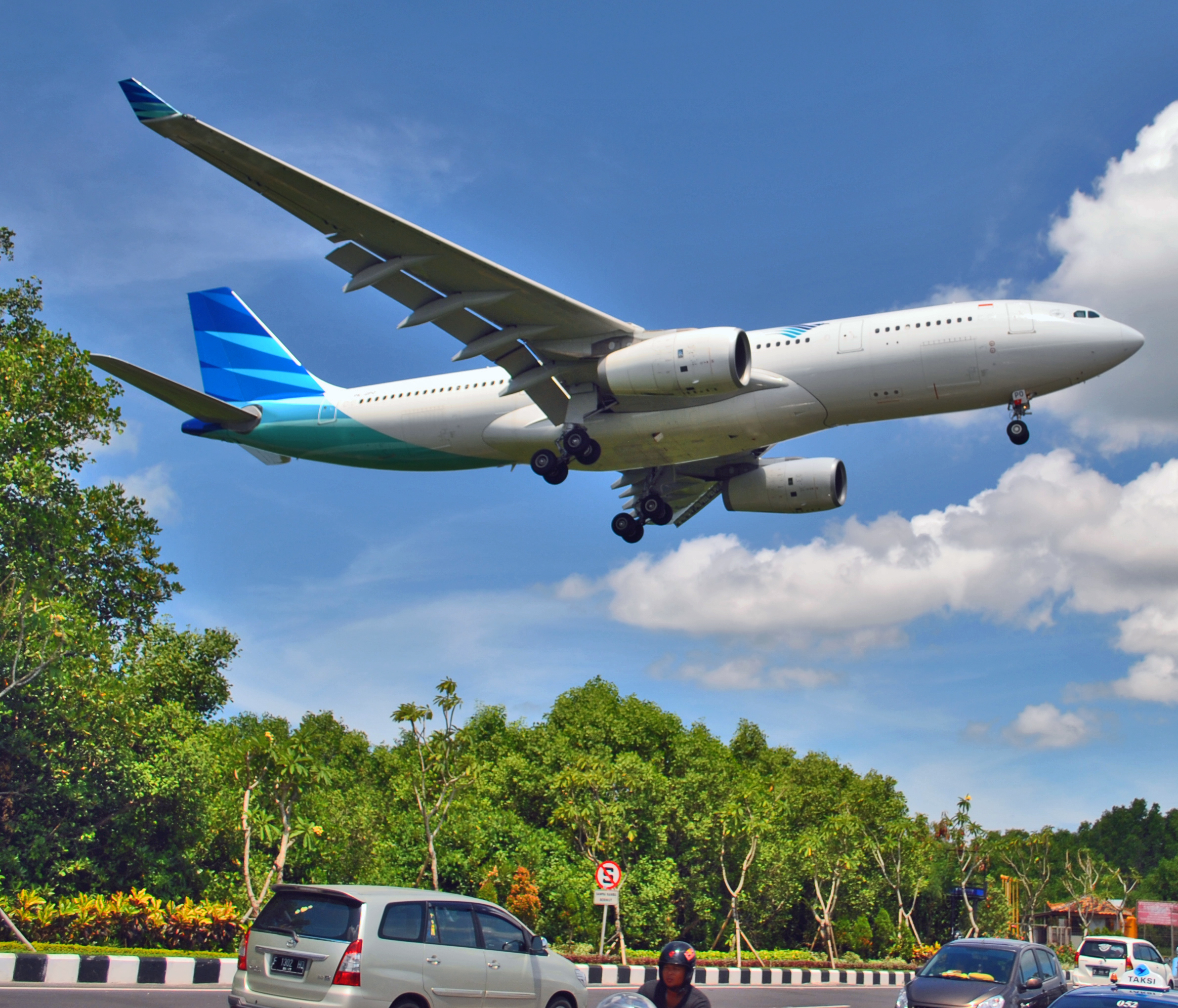 Airbus A330-200 (PK-GPO) milik Garuda Indonesia sedang mendarat di Bandara Ngurah Rai, Tuban, Kab. Badung, Bali